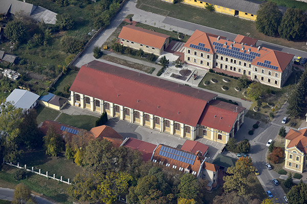 Tolna, Kulturális központ és könyvtár - légi felvétel